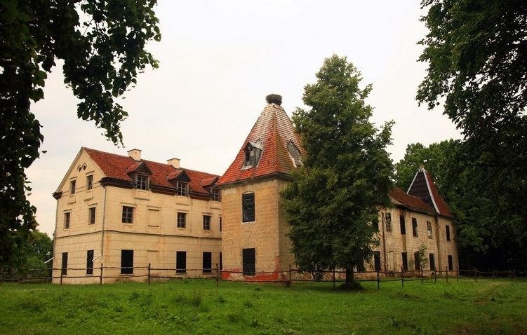 Sztynort – wieś w województwie warmińsko-mazurskim, w powiecie węgorzewskim, w gminie Węgorzewo